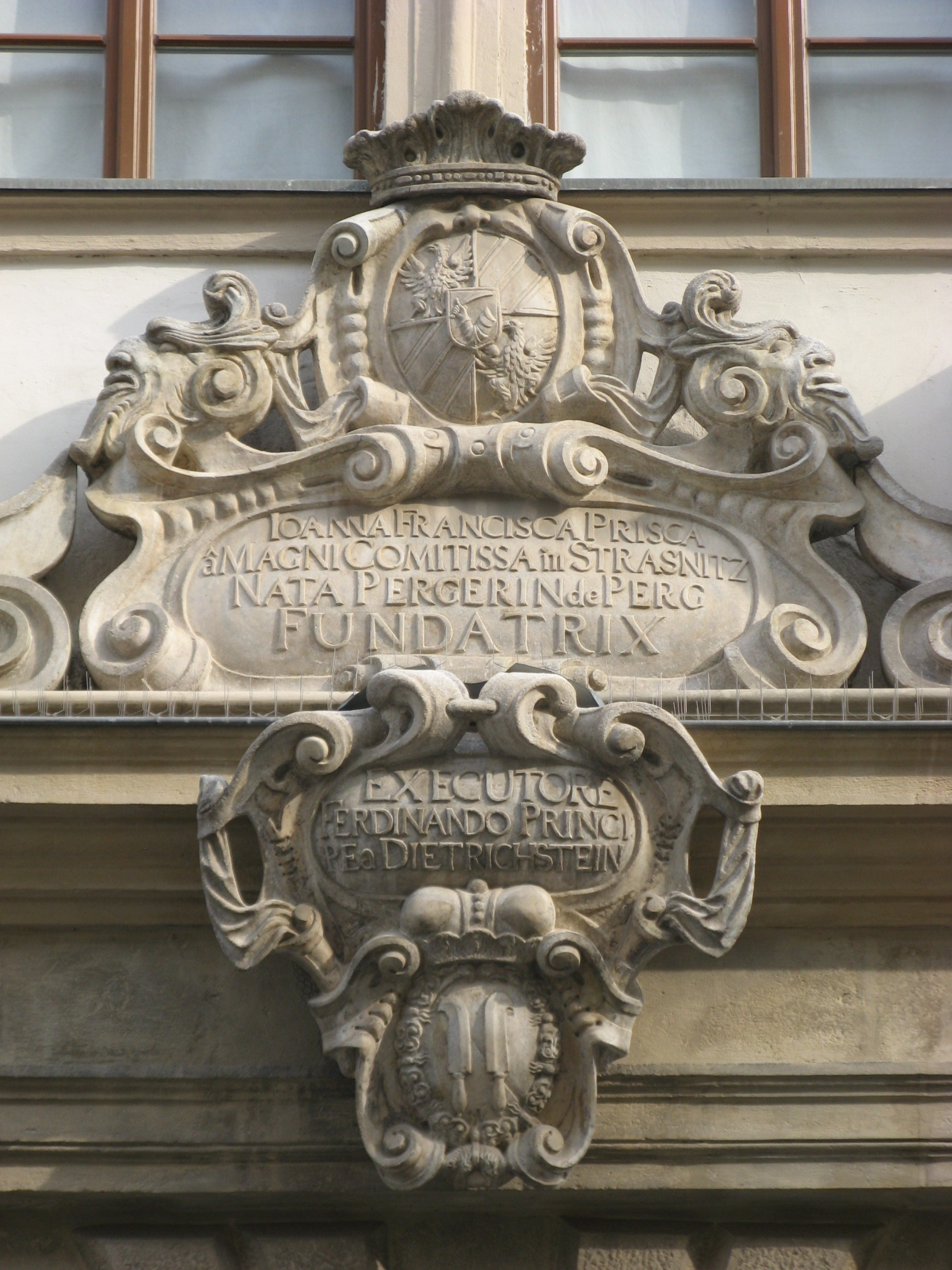 Palác šlechtičen, portál